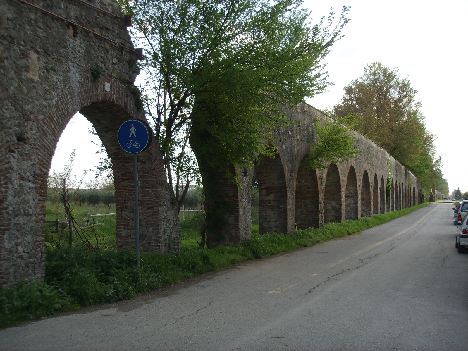 Acquedotto mediceo